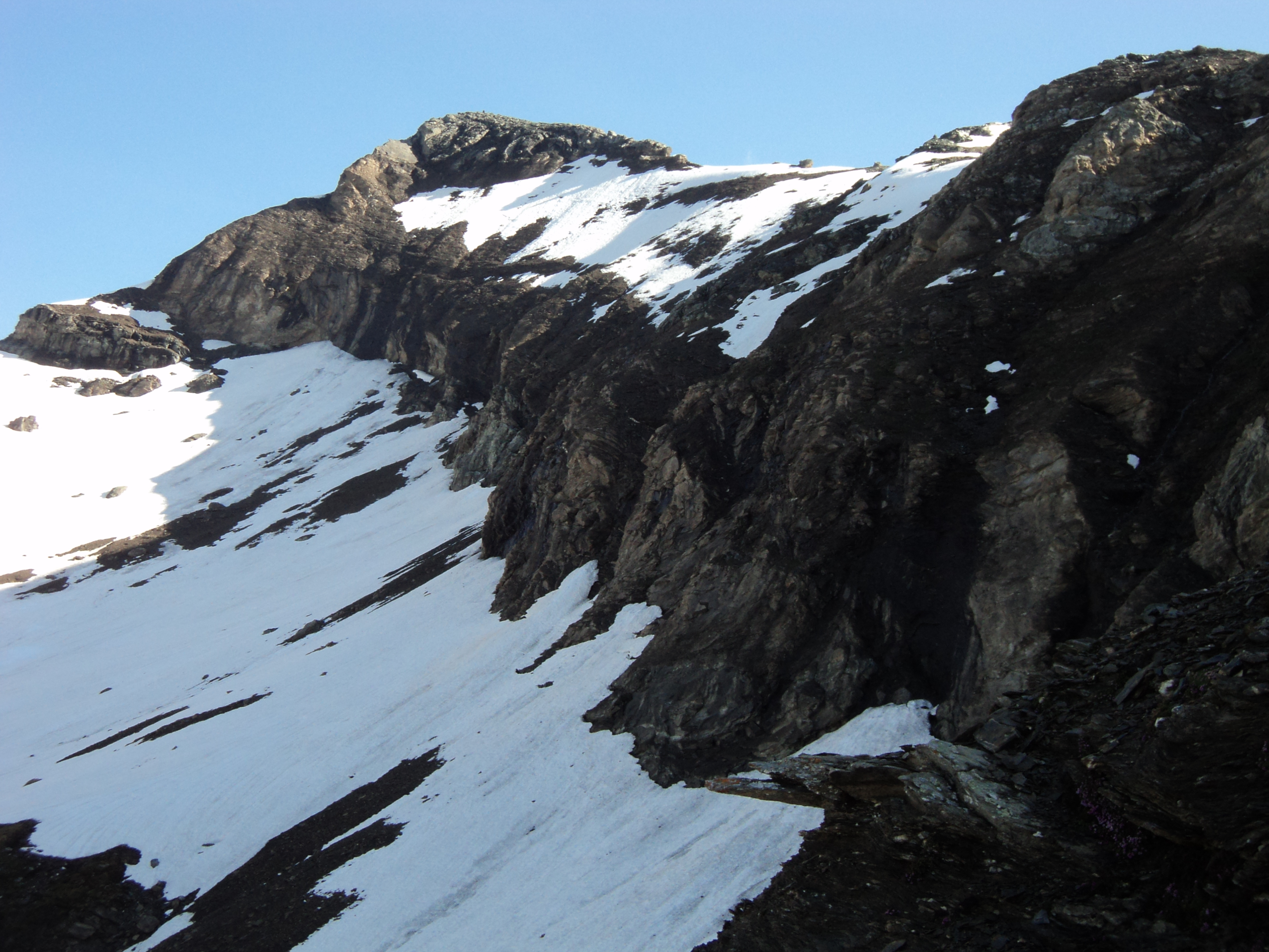 La vetta della Testa Grigia vista durante la salita dal colle Pinter